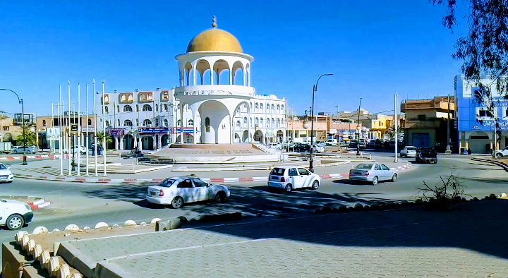 هذه الصورة من تصويري الخاص حيث انني قمت بإلتقاطها بعدست هاتفي على شكل فيديو ثم قمت بإلتقاط شاشة على هذه الصورة This is an image with the theme "Africa on the Move or Transport" from: Algeria